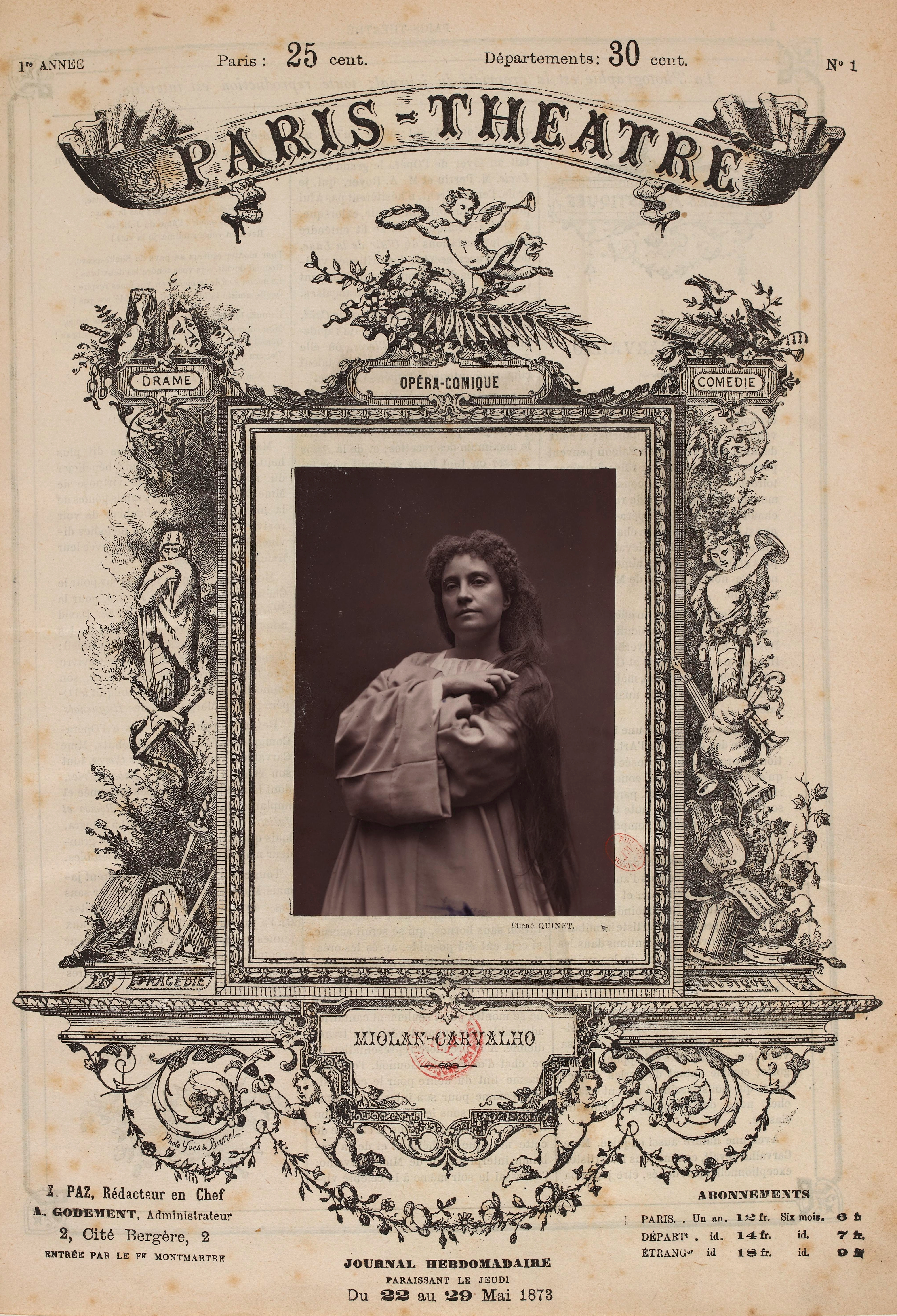 Hebdomadaire Paris-Théâtre, n°1, 22 mai 1873. Photographie de Caroline Miolan-Carvalho par Alexandre Quinet. Photoglyptie (woodburytype) et décors par Yves et Barret.